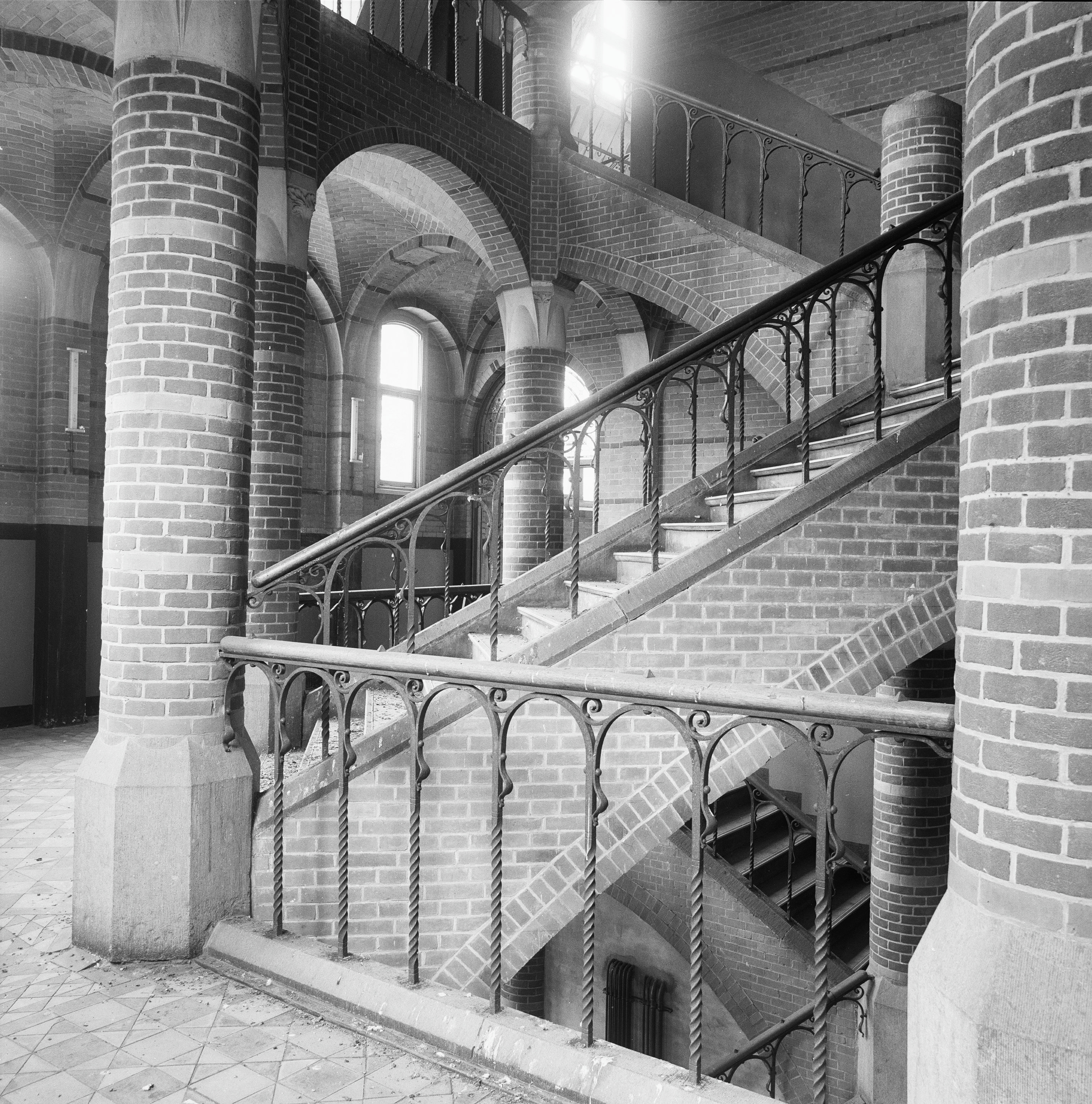 Teeken En Ambachtsschool: INTERIEUR, TRAPPENHUIS